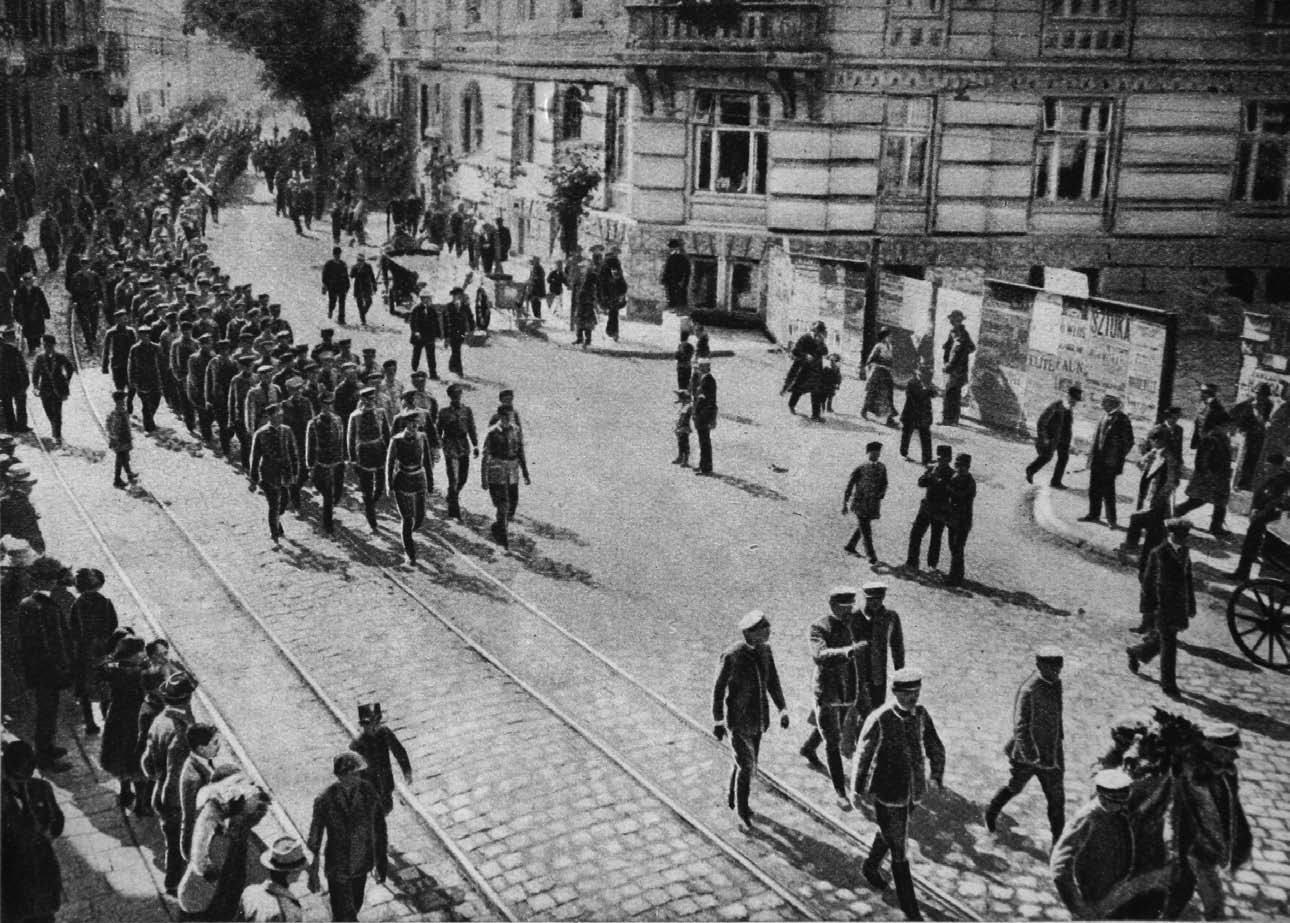 Przemarsz członków Związku Strzeleckiego przez Lwów, ulicą Zyblikiewicza w czasie uroczystości 50-lecia powstania styczniowego. Na czele Józef Piłsudski (z wyciągniętą ręką).